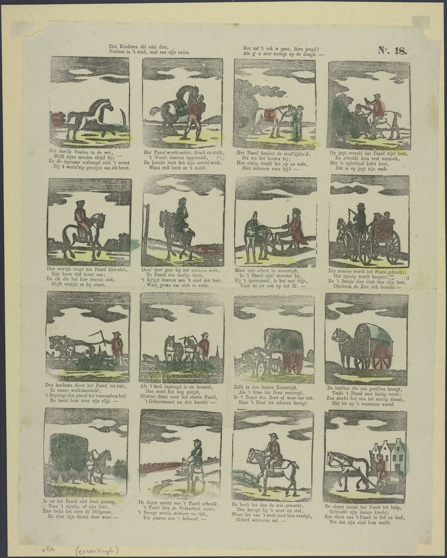 Centsprent met 4 x 4 houtsneden met afbeeldingen van paarden. Als veulen, opgegroeid en sterk, statig, mee op jacht, sierlijk, uit rijden met zijn heer, op het ijs met een arreslee, voor een rijtuig, als trekpaard voor ploeg en eg, voor de hooiwagen, een huifkar, diligence, trekschuit en sleper. Met vierregelige rijmende onderschriften.